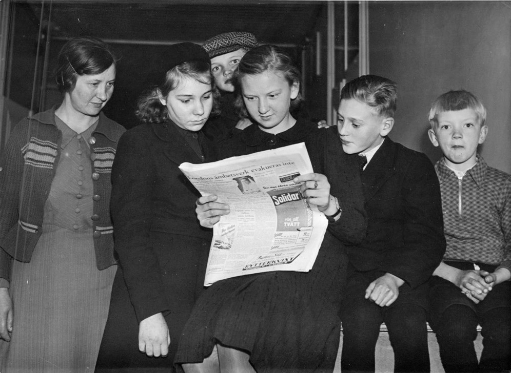 Rågöborna till SverigeSvenskbybor som anlände till Sverige från Rågö hösten 1940.